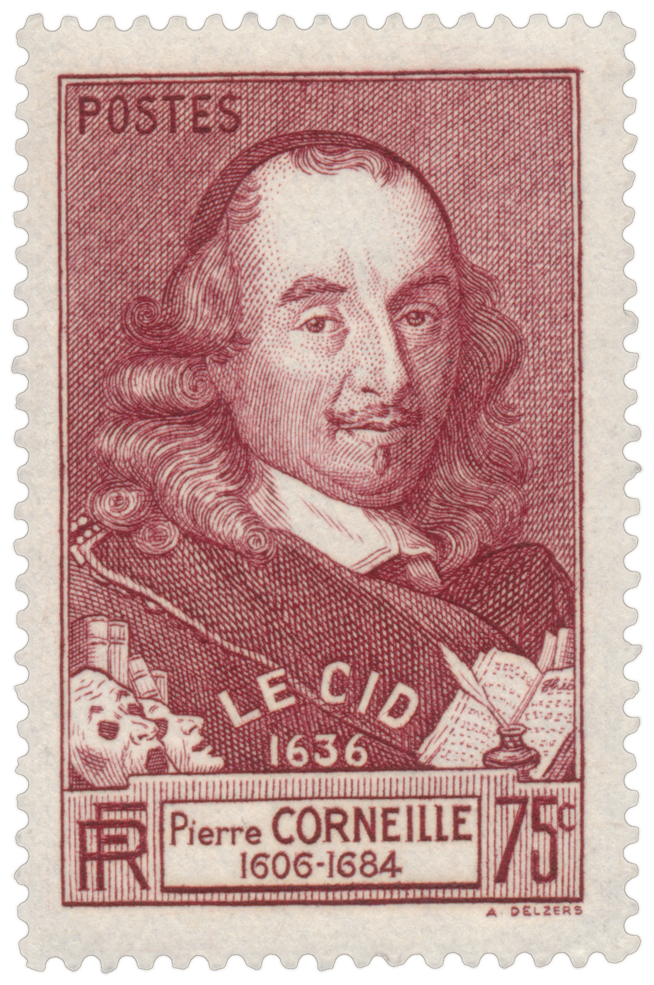 Pierre Corneille (1606-1684)